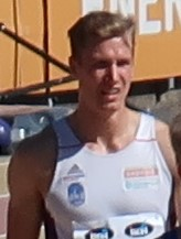 Ilari Manninen 200 metrin juoksun alkueränsä jälkeen Kalevan kisoissa 2020.